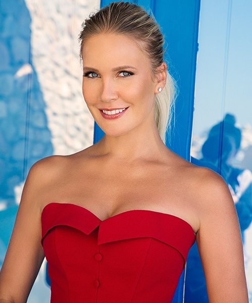 Российский тележурналист, телеведущая и телепродюсер Елена Летучая